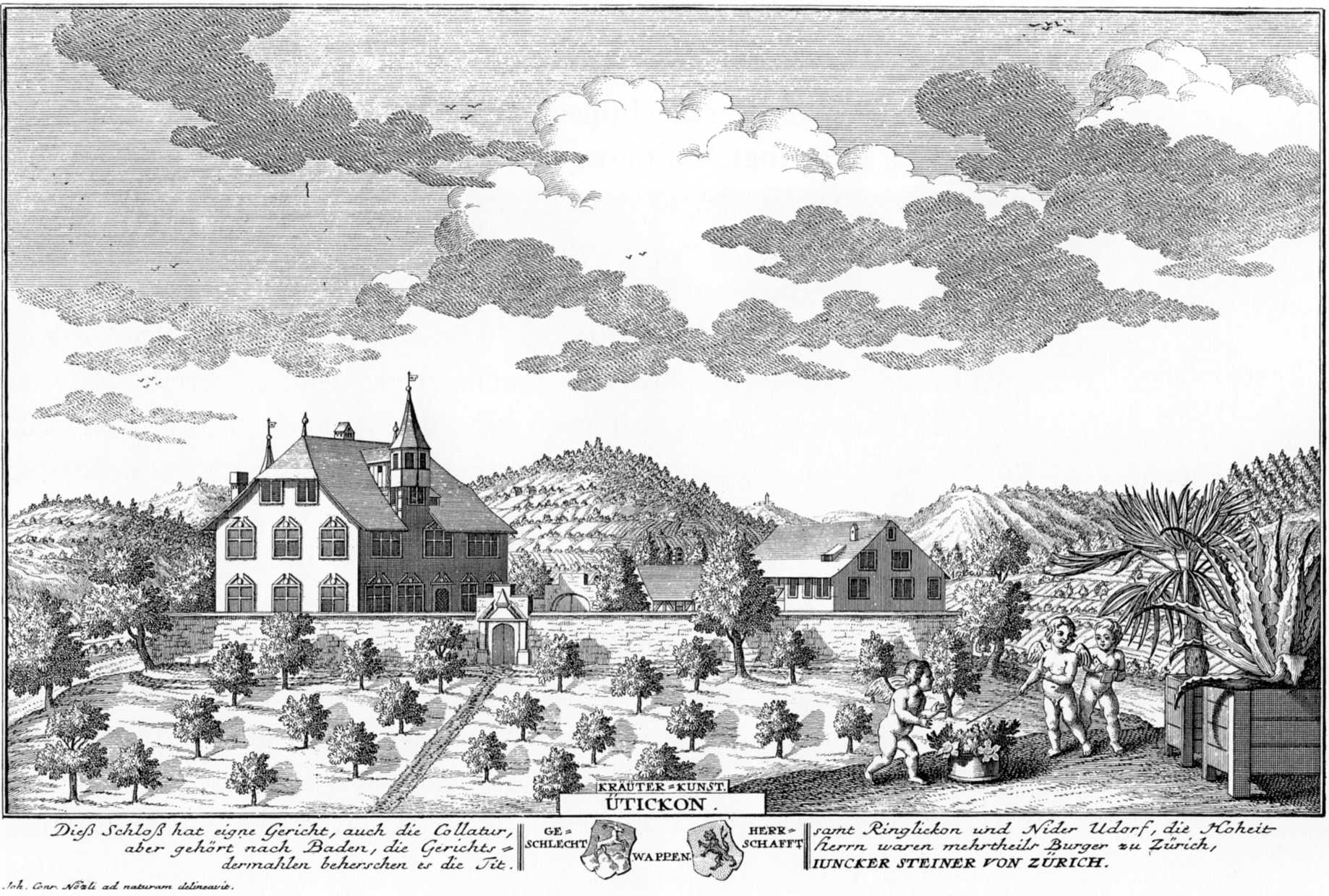 Schloss Uitikon im Jahr 1742. Erschienen in Herrlibergers Eigentliche Vorstellung der Adelichen Schlösser im Zürich Gebieth, Blatt 14, zweite Lieferung 1743 und Topographie der Eydgnoßschaft, fünfte Lieferung 1755.